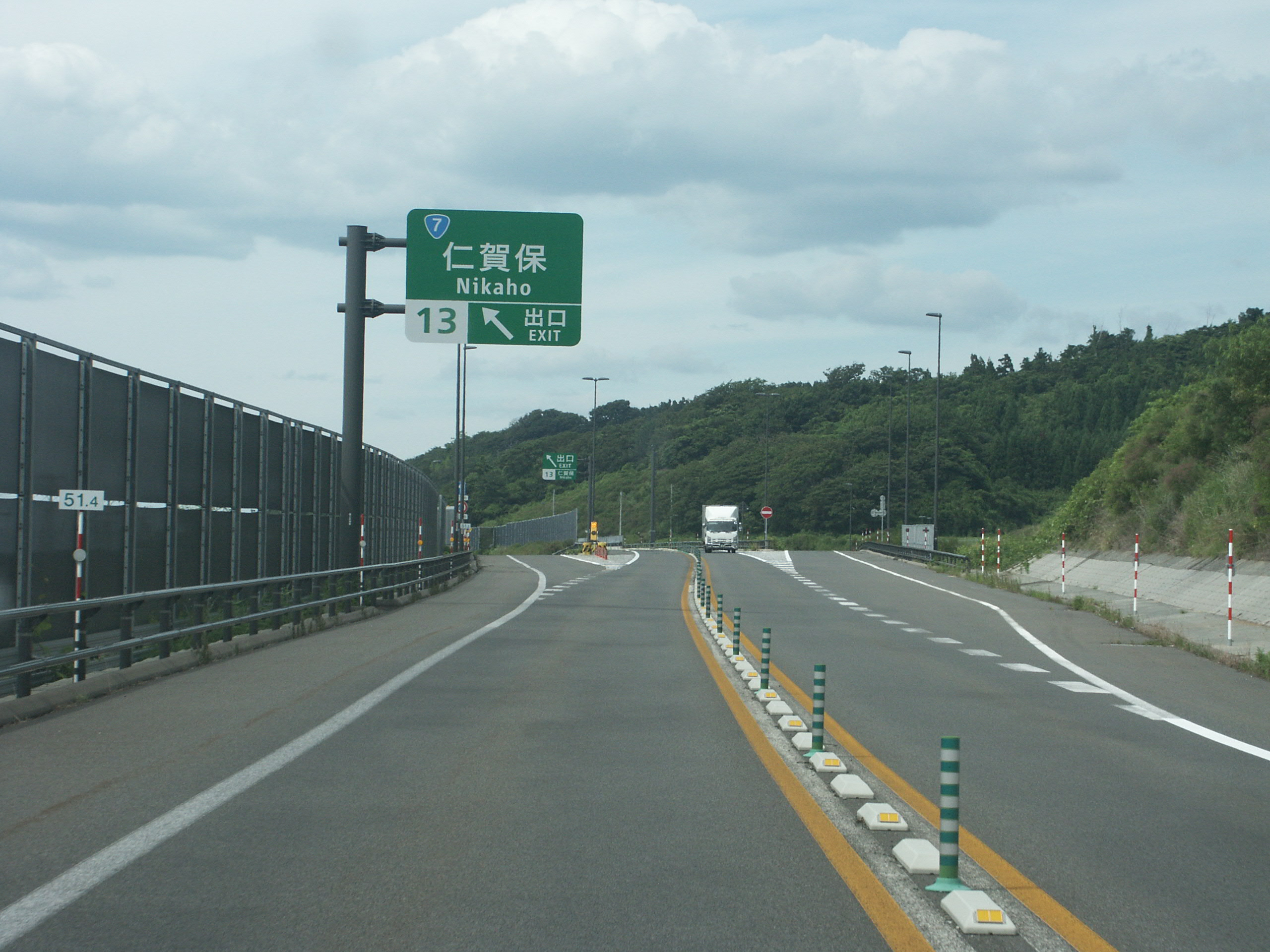 日本海沿岸東北自動車道（国道7号象潟仁賀保道路）仁賀保IC出口（象潟IC方面側）